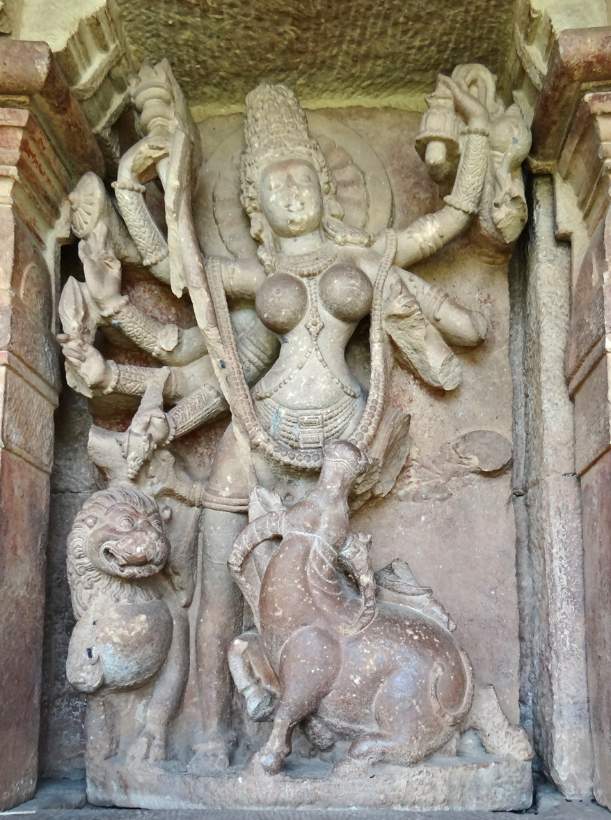 La statue de Durga Mahishamardini, à huit bras terrassant le buffle sur les murs du temple de Durga Le temple de Durga est unique car son plan est de type oblong et absydal. Il est inspiré des temples rupestres bouddhiques. Il a été construit en 550 AD selon certains chercheurs ou à la fin du VIIème siècle selon d'autres. Aihole dans le Karnataka occupe une place unique dans l'histoire de l'architecture religieuse de l'Inde. Sous la dynastie des rois Chalukya (450-750 A.D.), cette ville, la première capitale du royaume, a été un lieu d'expérimentation pour la construction des premiers temples maçonnés. Ces temples ont succédé aux sanctuaires rupestres, creusés dans le rocher. Aihole est ainsi le berceau de l'architecture du nord (style nagara) et du sud (style dravidien) Le site compte près de 150 temples hindous et jaïns dont certains ne sont pas terminés par les artisans constructeurs qui y apprenaient les techniques de construction et de sculpture. Articles de Wikipedia sur Aihole et le temple de Durga